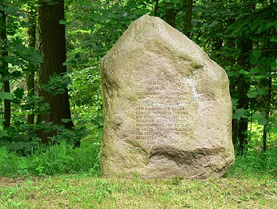 Gedenkstein zum Bau des Allerkanals, Aufschrift: Allerkanal, erbaut 1860-63, Kostenaufwand 45.000 Thaler, den Bauern der Allerdörfer von Wolfsburg bis Diekhorst, die ihn schufen, dem Wasserbauinspektor August Hess in Celle, der ihn baute und den Männern, die ihn betreuten zum Gedenken Foto aufgenommen von Benutzer Benutzer:Axel Hindemith, Juni 2005